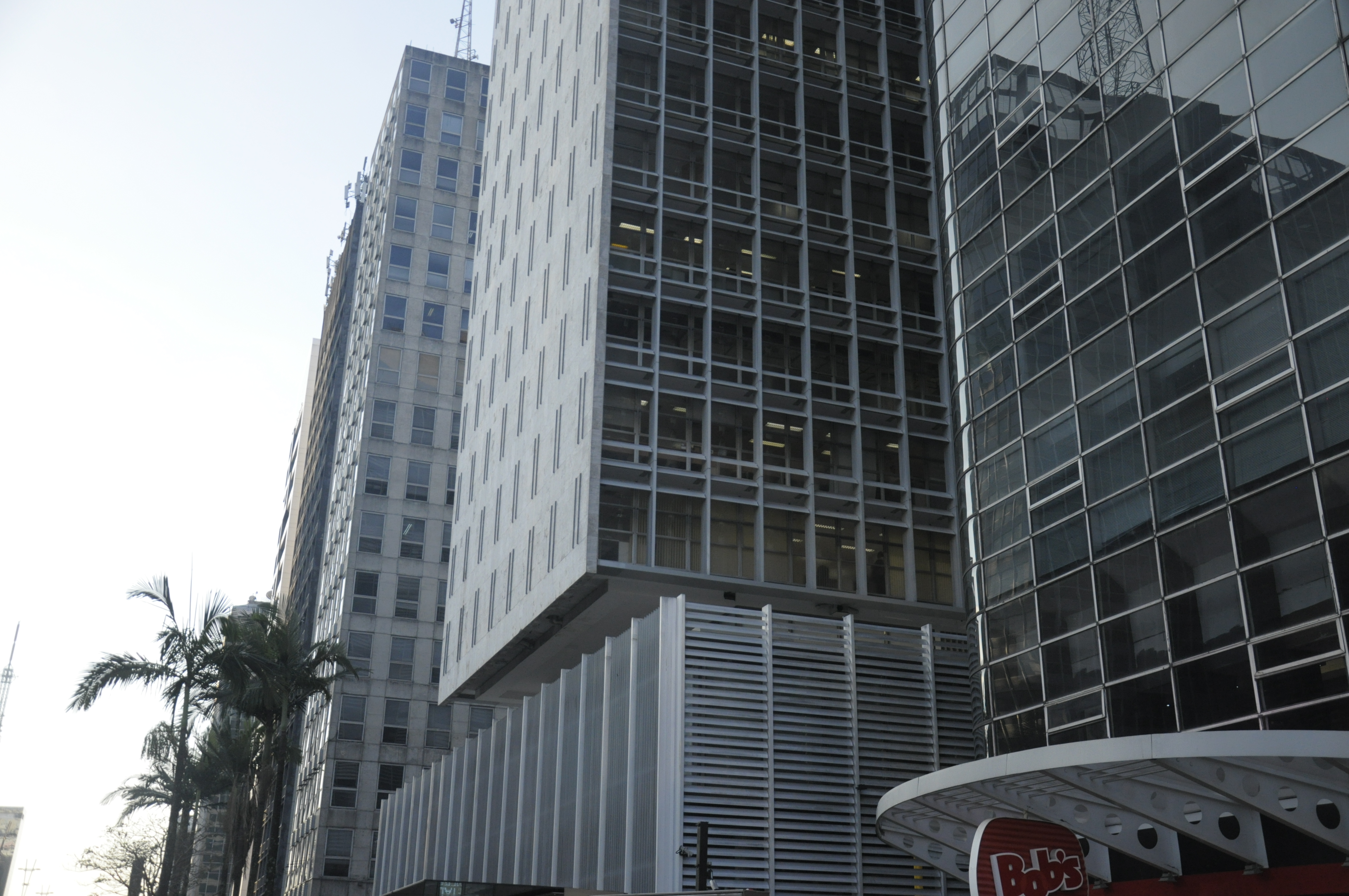 Lado direito do Edifício Banco Sul Americano - São Paulo (SP), Brasil